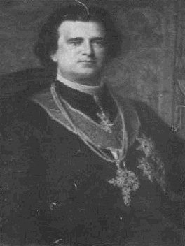 Robert Lichnovský z Voštic (1822 - 1879), Český římskokatolický duchovní.